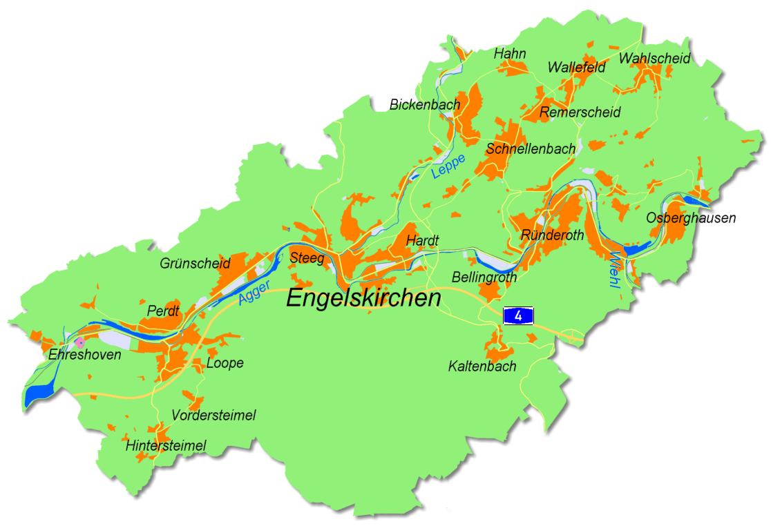 Karte von Engelskirchen mit den wichtigsten Ortsteilen 2005